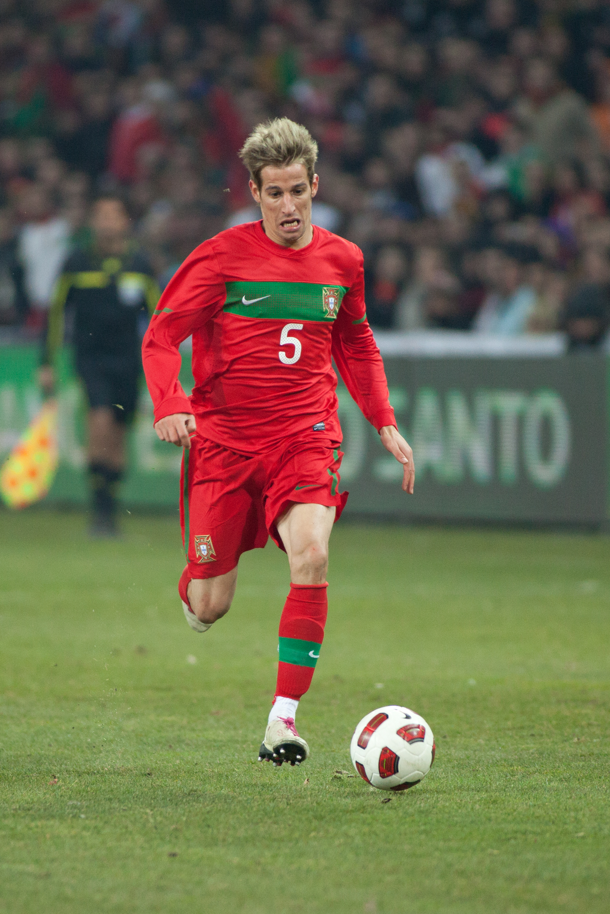 Fábio Coentrão lors d'un match amical Portugal-Argentine à Genève